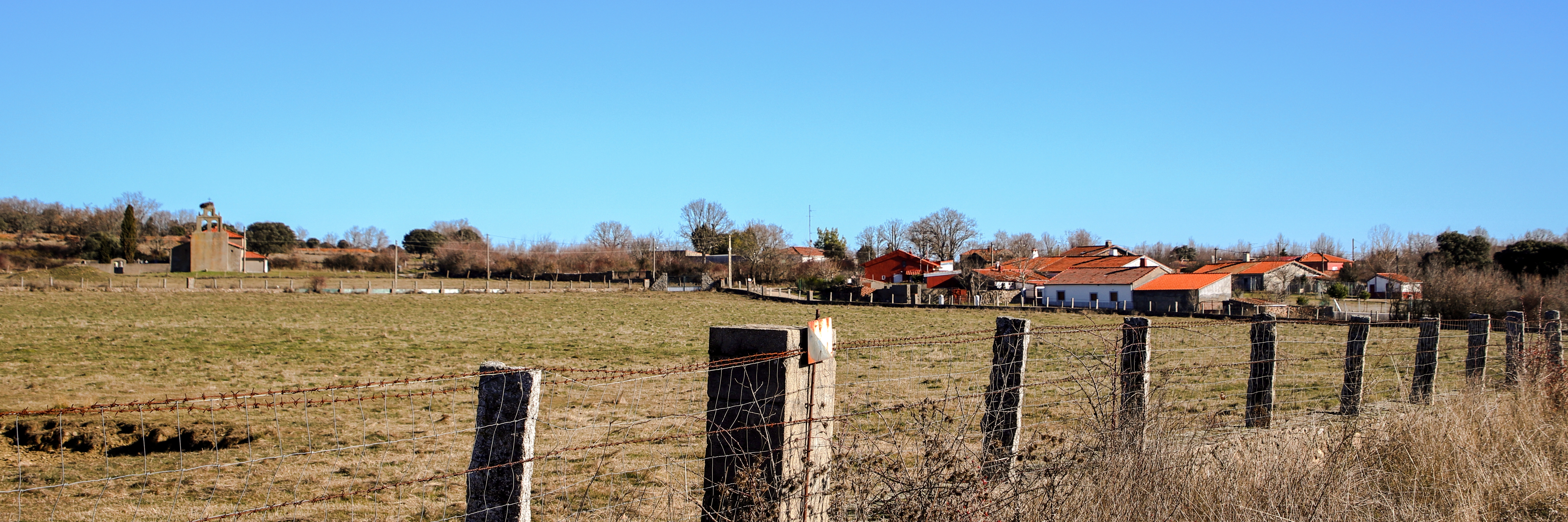 Navarredonda de Salvatierra es una localidad del municipio de Frades de la Sierra, perteneciente a la comarca de Entresierra, provincia de Salamanca.